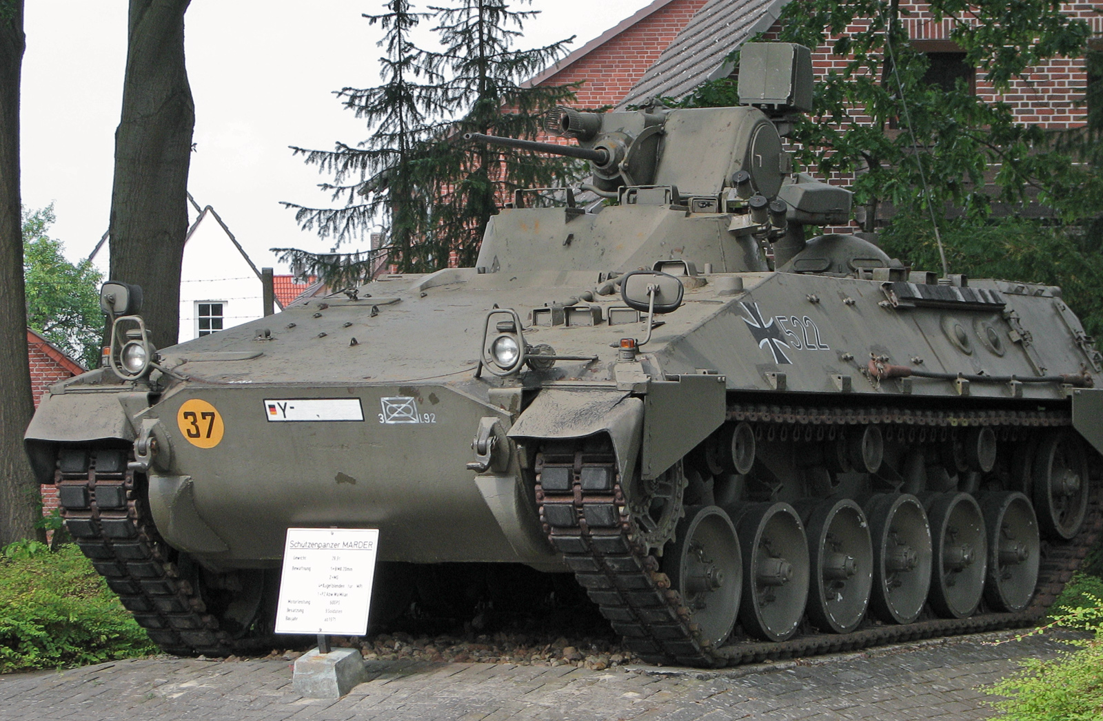 Dieses Bild zeigt einen Marder 1, ausgestellt im Eingangsbereich des Panzermuseums in Munster.